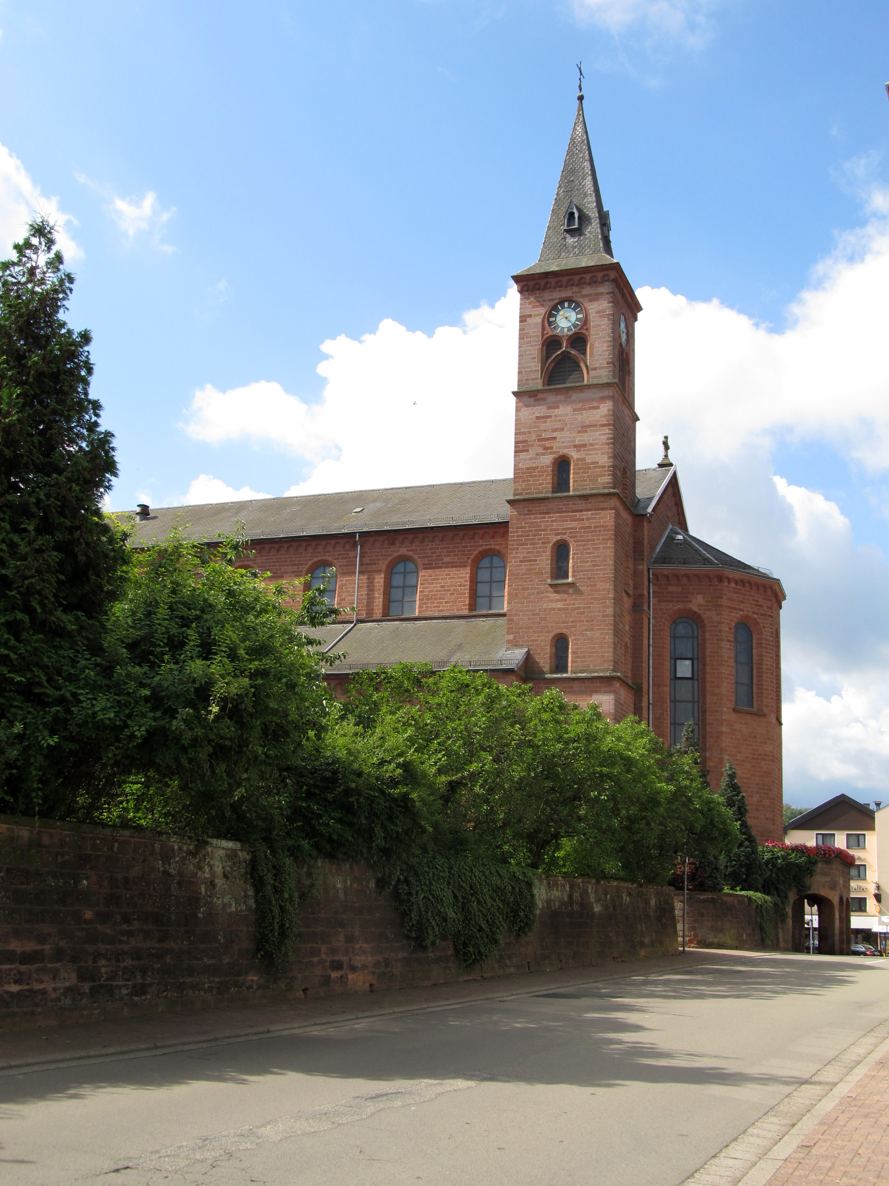 Die katholische Pfarrkirche St. Martin in Bexbach, Saarland